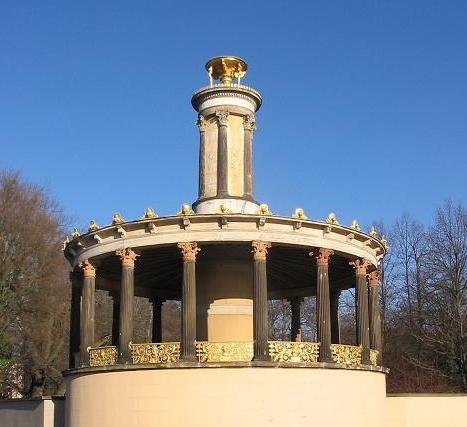 Große Neugierde, Schloss Glienicke, Berlin 1835/1837 von Karl Friedrich Schinkel an der Glienicker Brücke als Aussichtspavillon im Park des Schlosses Glienicke errichtet. 1938 ein Stück nach Norden versetzt. 2005 restauriert.